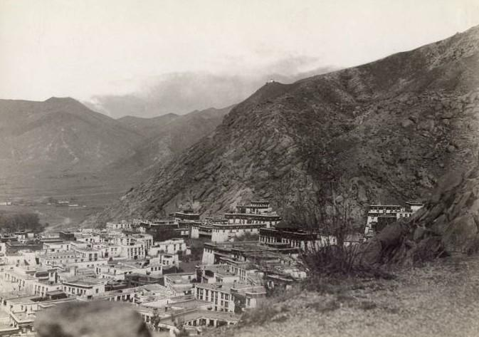 Монастырь Сэра. Скрытая камера в молитвенной мельнице.